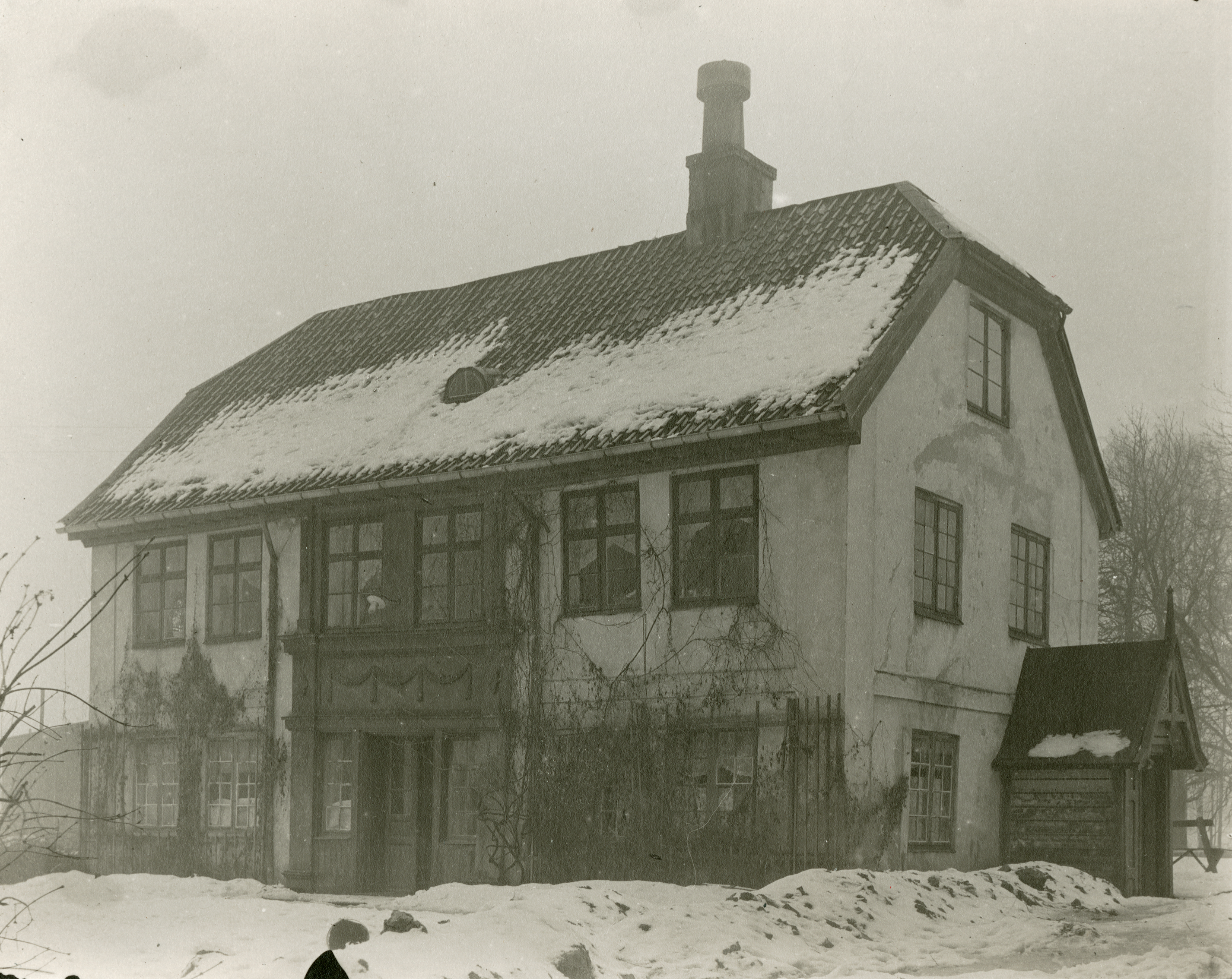 Sofienlund i Vestre Aker, Oslo